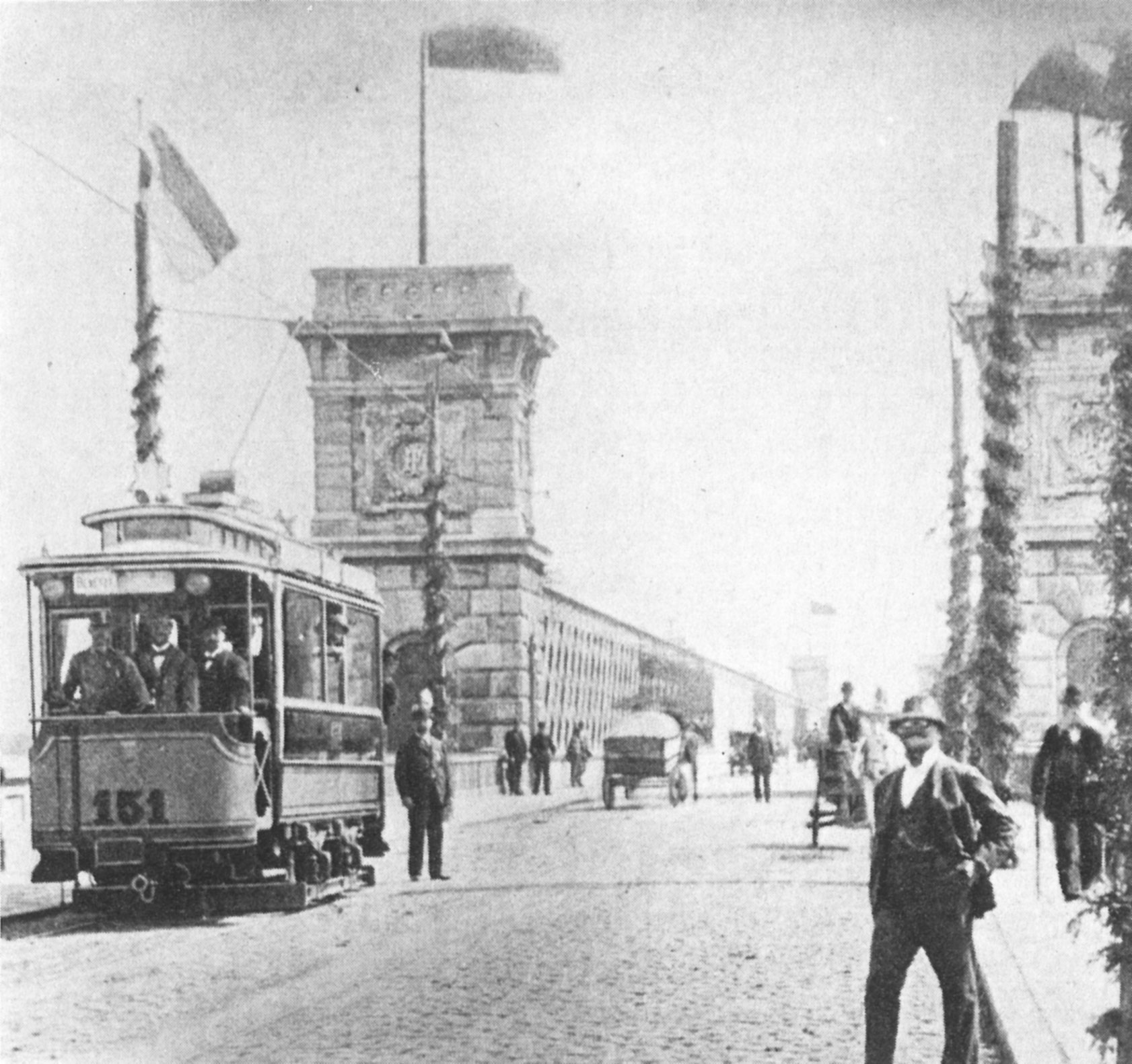 Die Kronprinz-Rudolf-Brücke (Heute: Reichsbrücke) in Wien